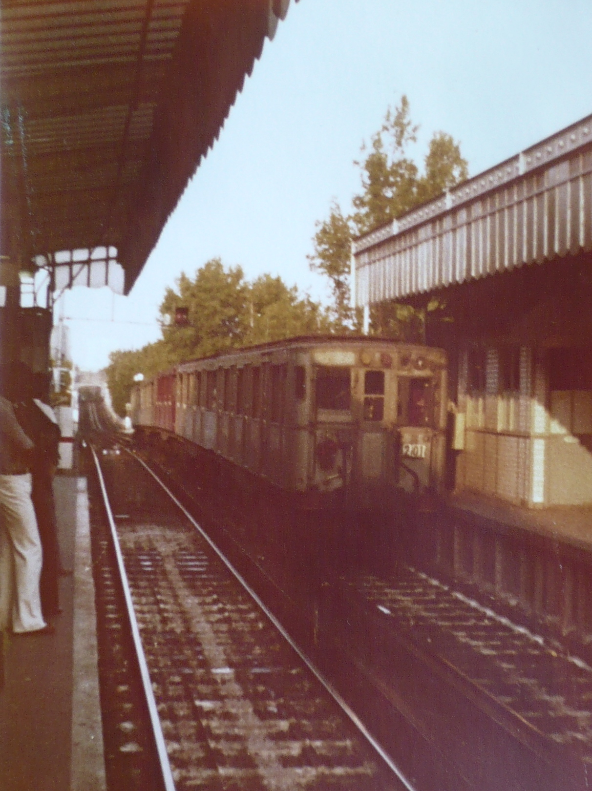 Station Barbès – Rochechouart, Métrolinie 2 Paris